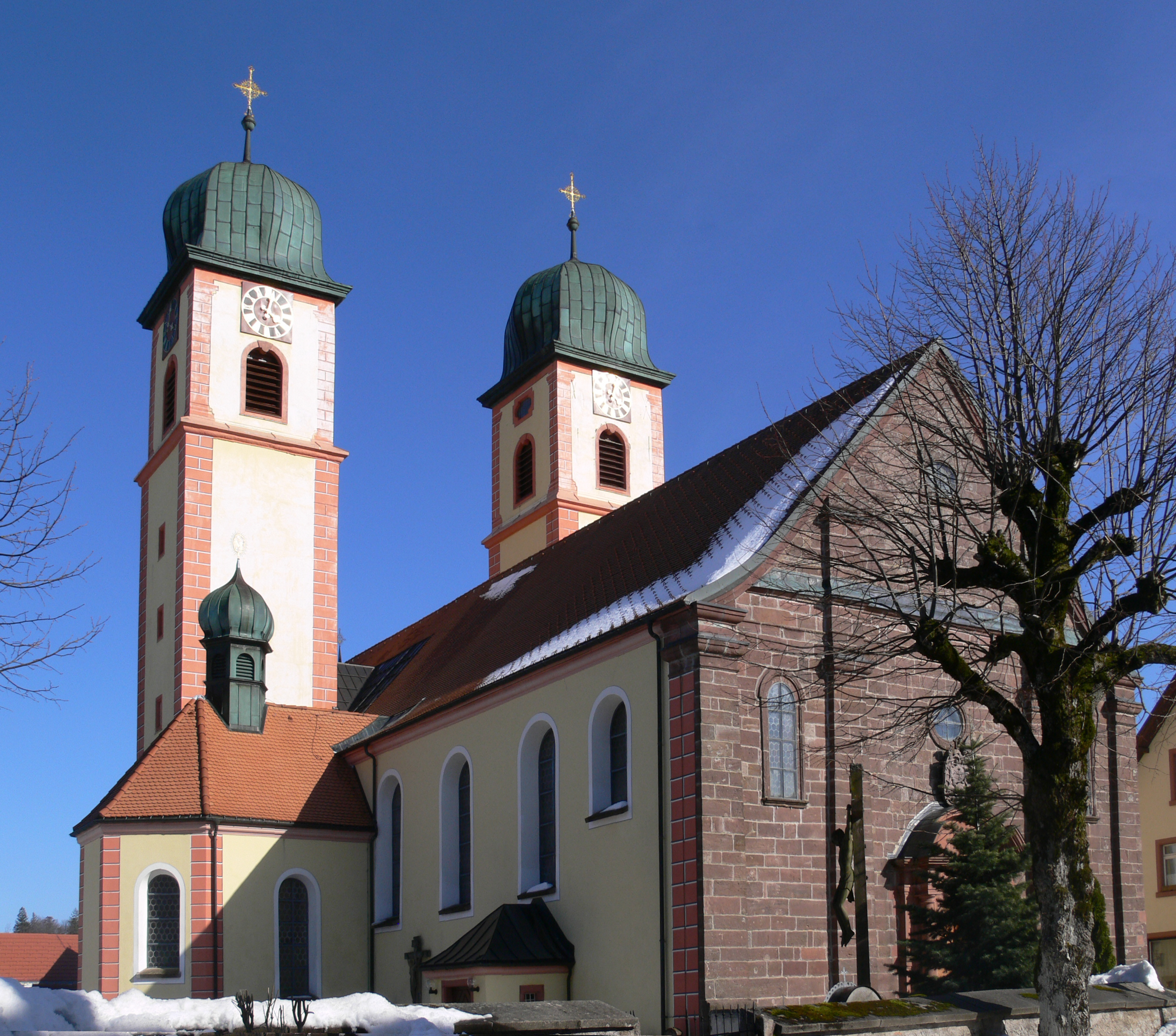 Sankt Märgen, Klosterkirche